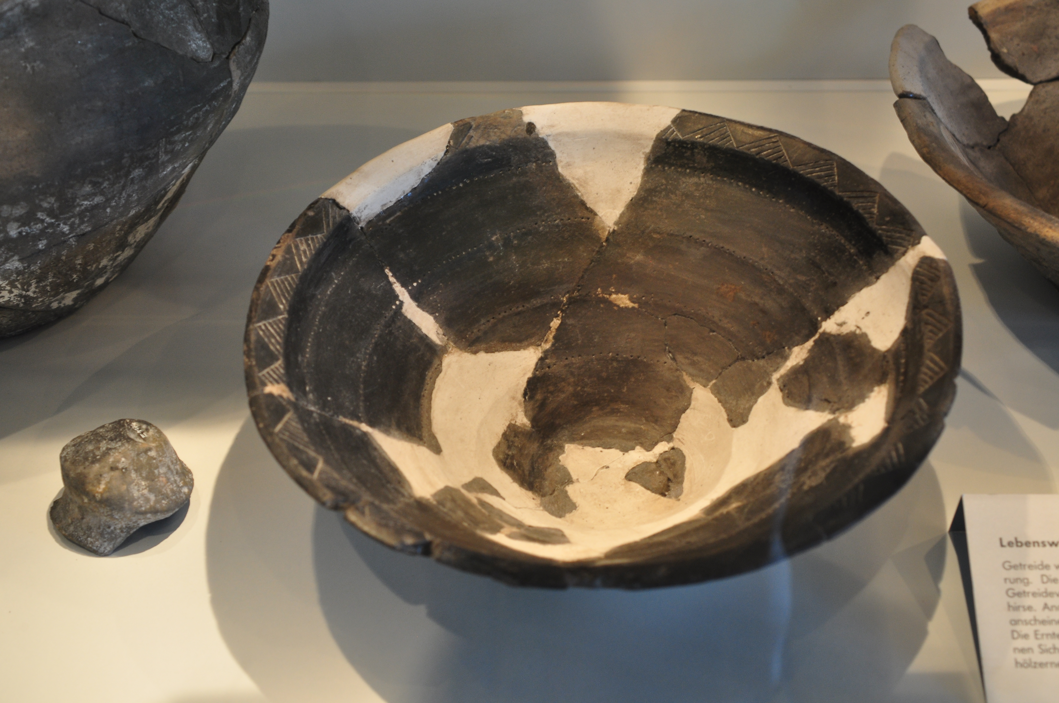 Storen, neolithische Seeufersiedlungen in Greifensee (Switzerland)